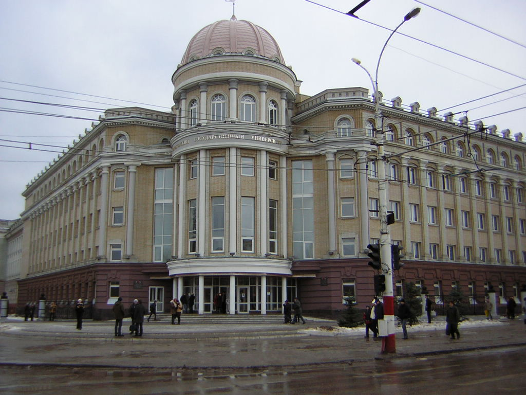 10 корпус Саратовского Государственного Университета